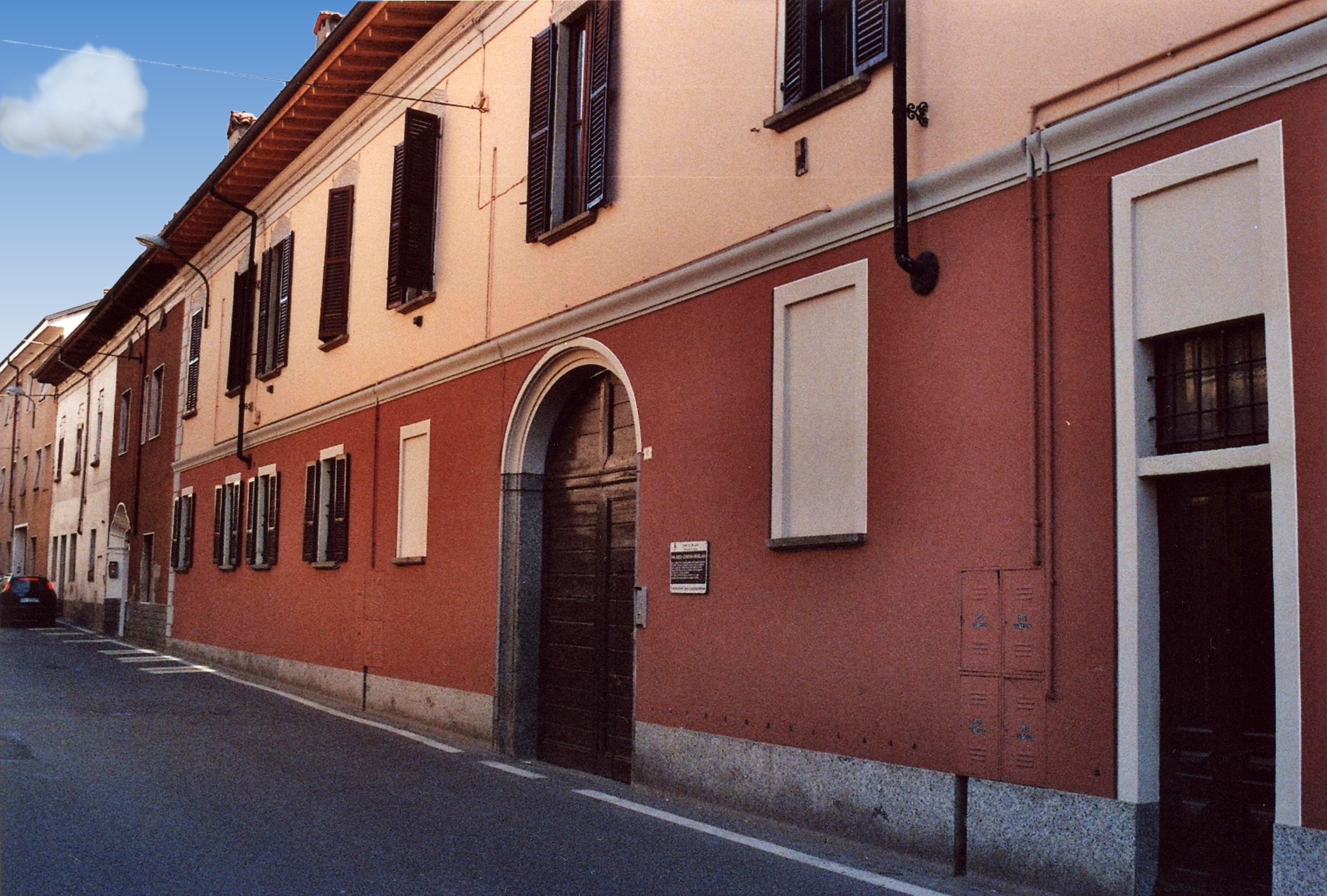 Fara Novarese (NO), Palazzo Contini-Dessilani , facciata.